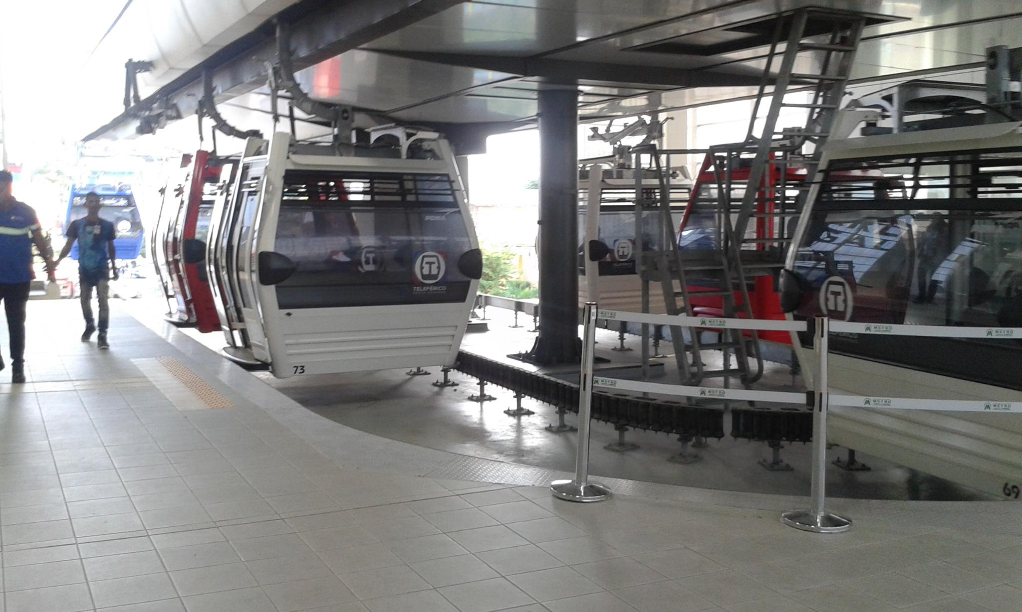 Estación teleférico Santo Domingo